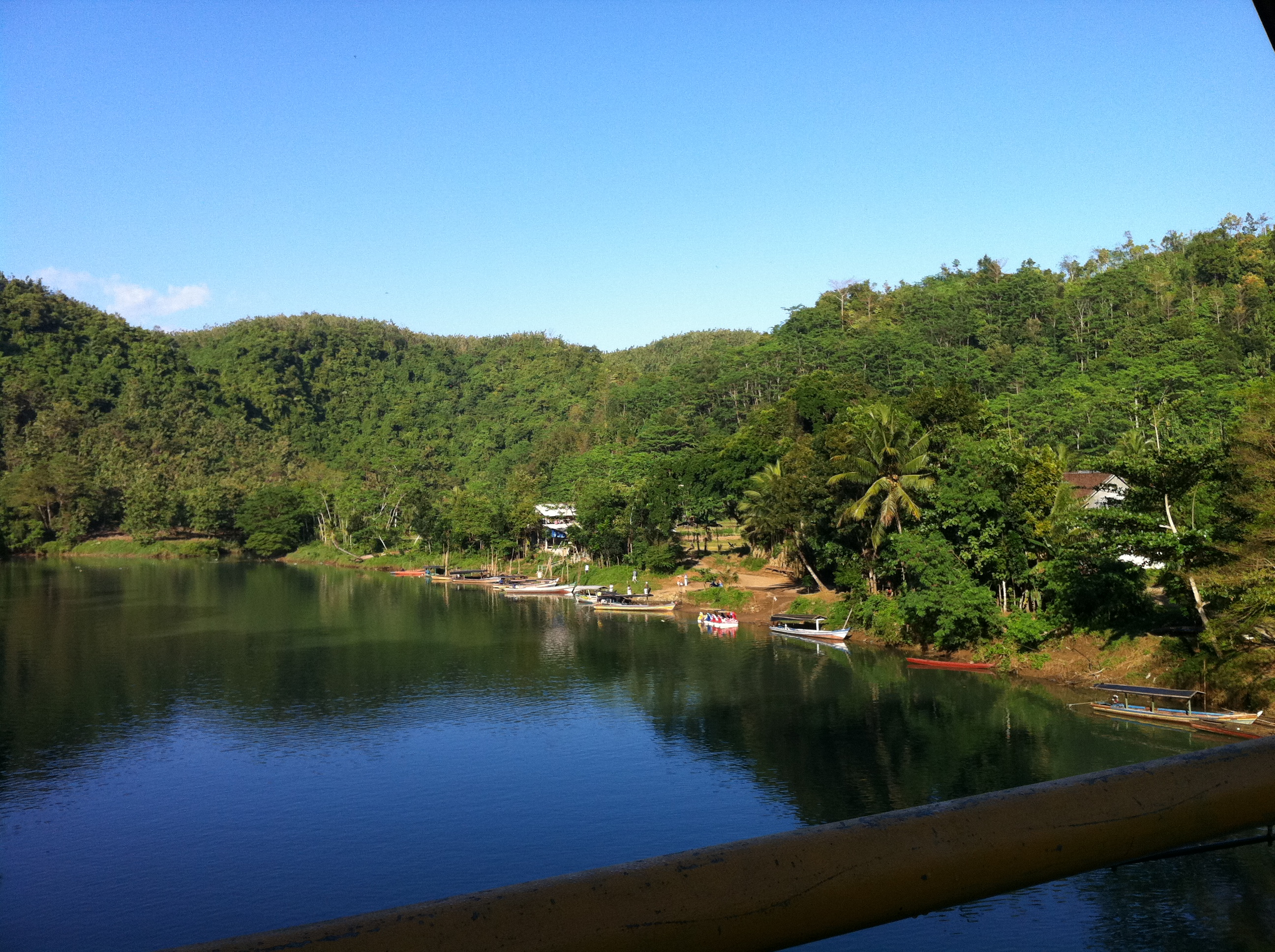 Sumberjaya, Tegal Buleud, Sukabumi, West Java, Indonesia